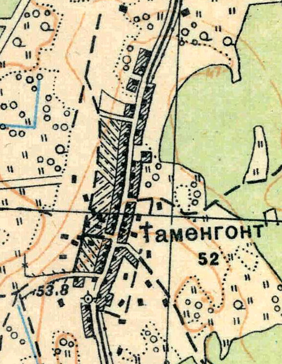 Топографическая карта Ленинградской области, квадрат О-35-12-А-в (Таменгонт), деревня Таменгонт